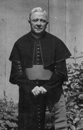 Josef Hronek (1890-1954), český římskokatolický teolog, duchovní, vysokoškolský pedagog, církevní a literární historik